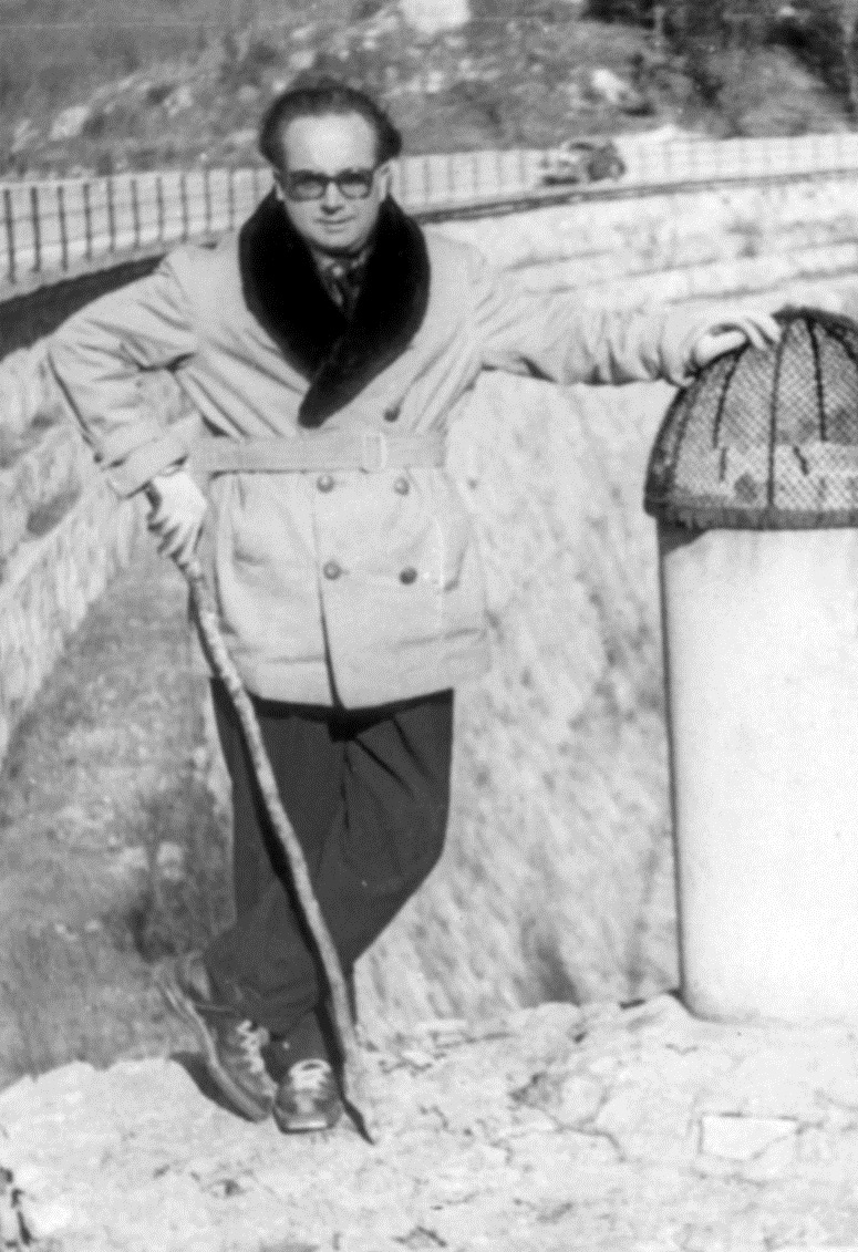 Francisco Mateu en la Vall de Bohí en 1950